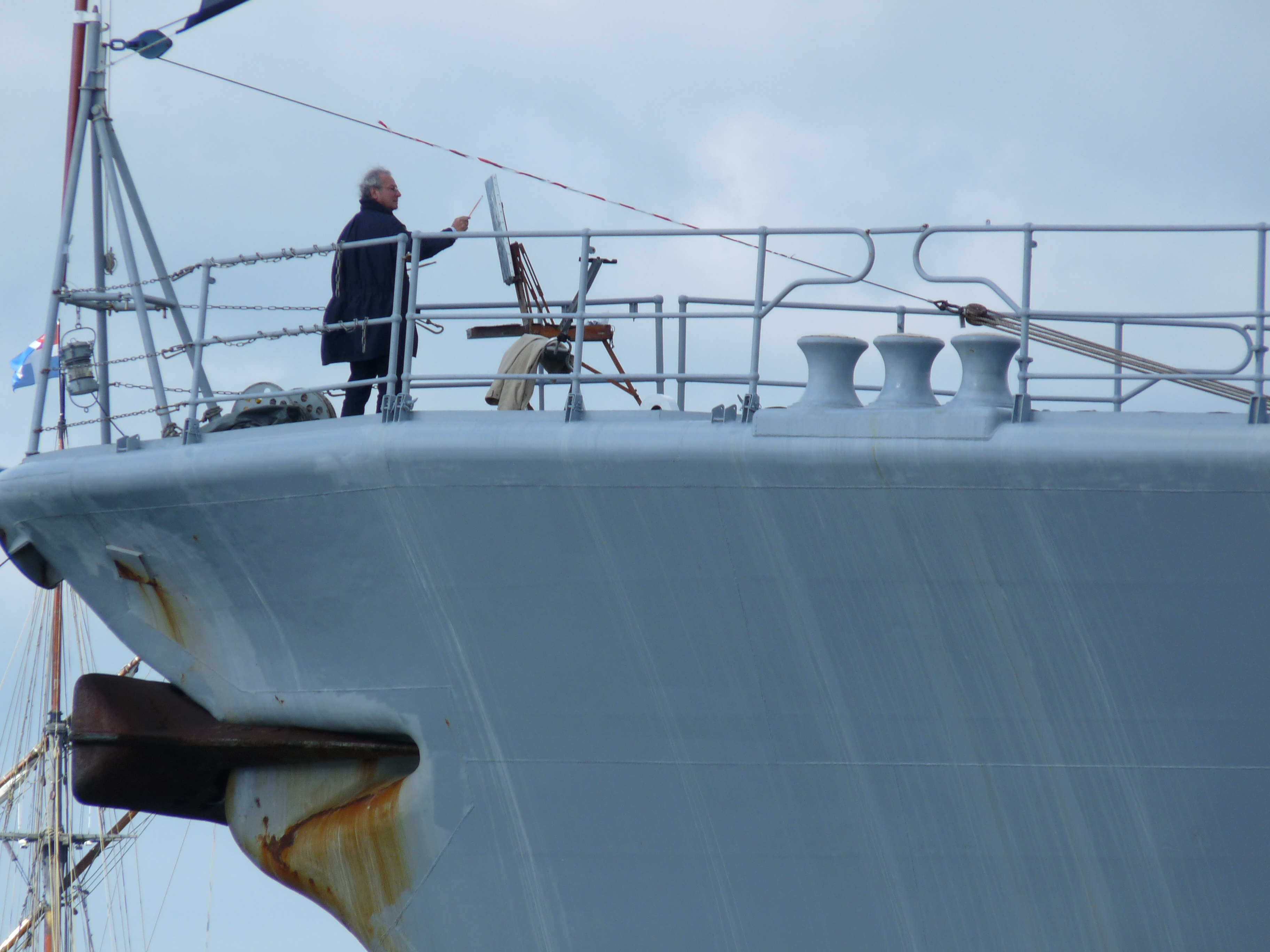 Les Tonnerres de Brest 2012 : Un peintre de marine (? à identifier) en train de peindre à l'avant de la Frégate De Grasse